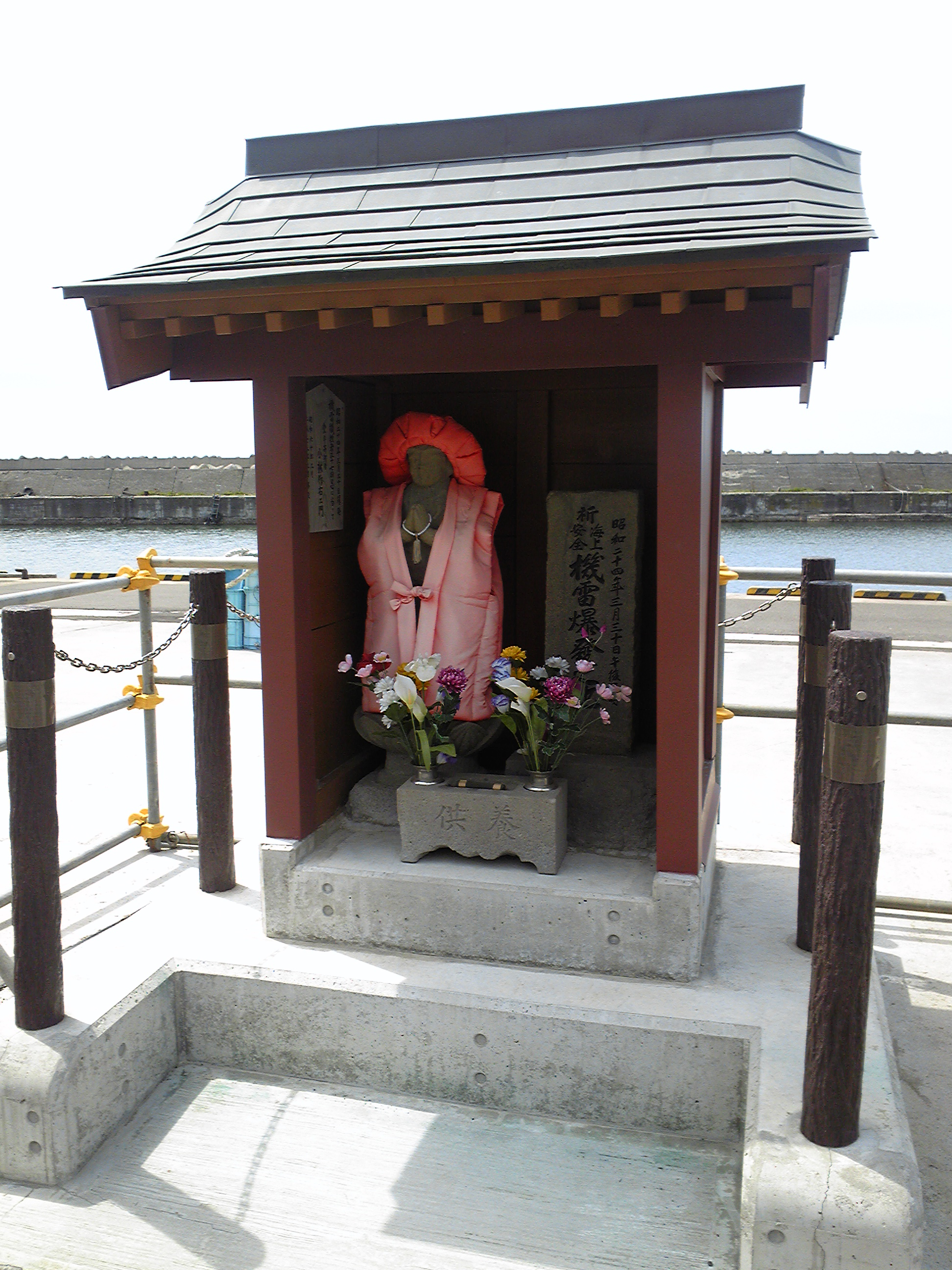 名立機雷爆発事件の犠牲者を供養する地蔵尊（新潟県上越市名立区名立小泊）